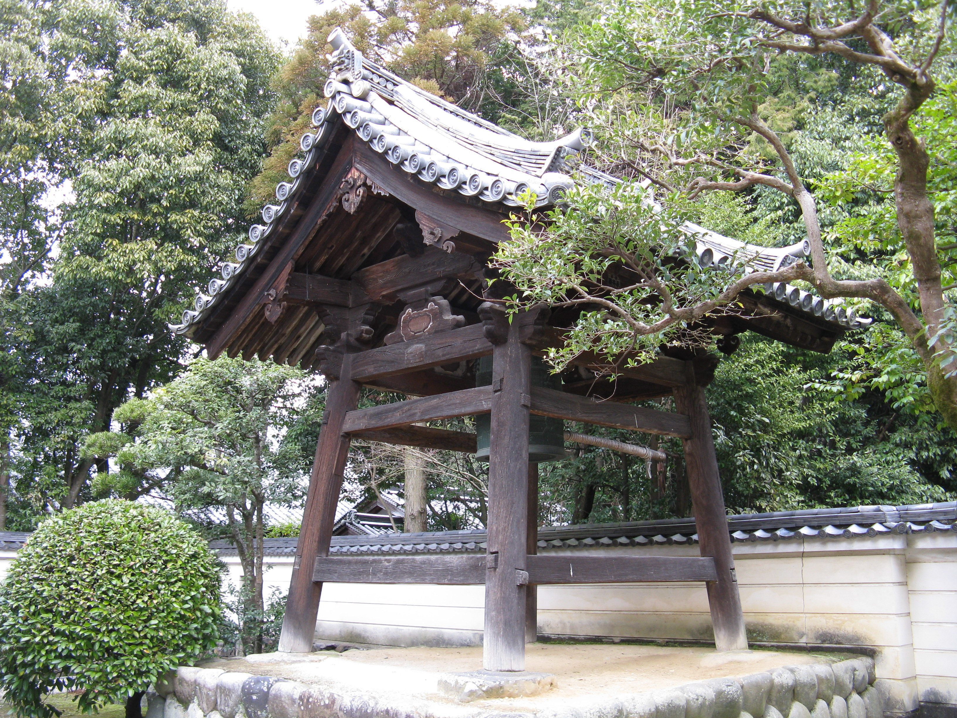 秋篠寺 鐘楼